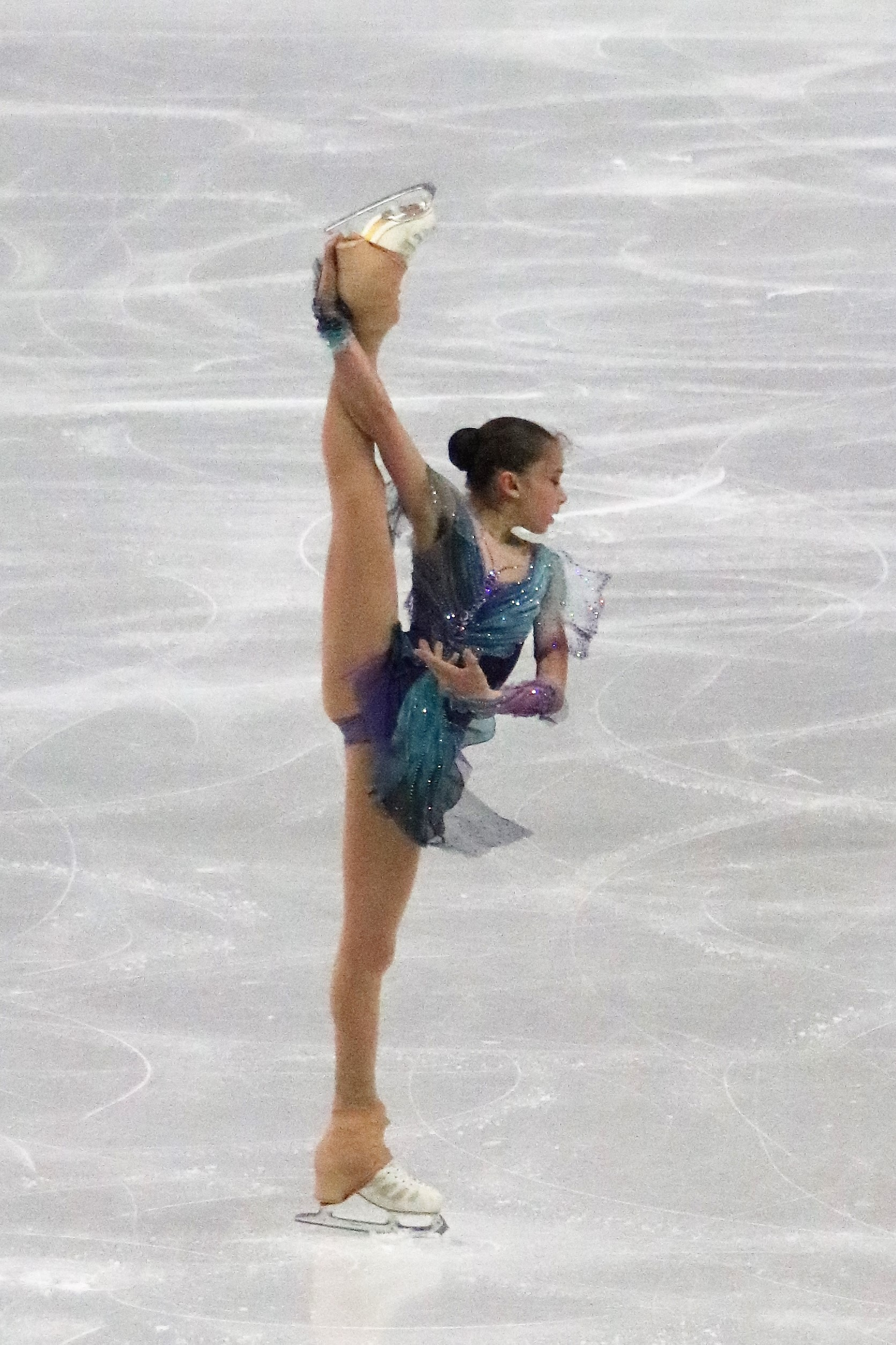 Камила Валиева (Россия) на финале юниорского Гран-при 2019-2020